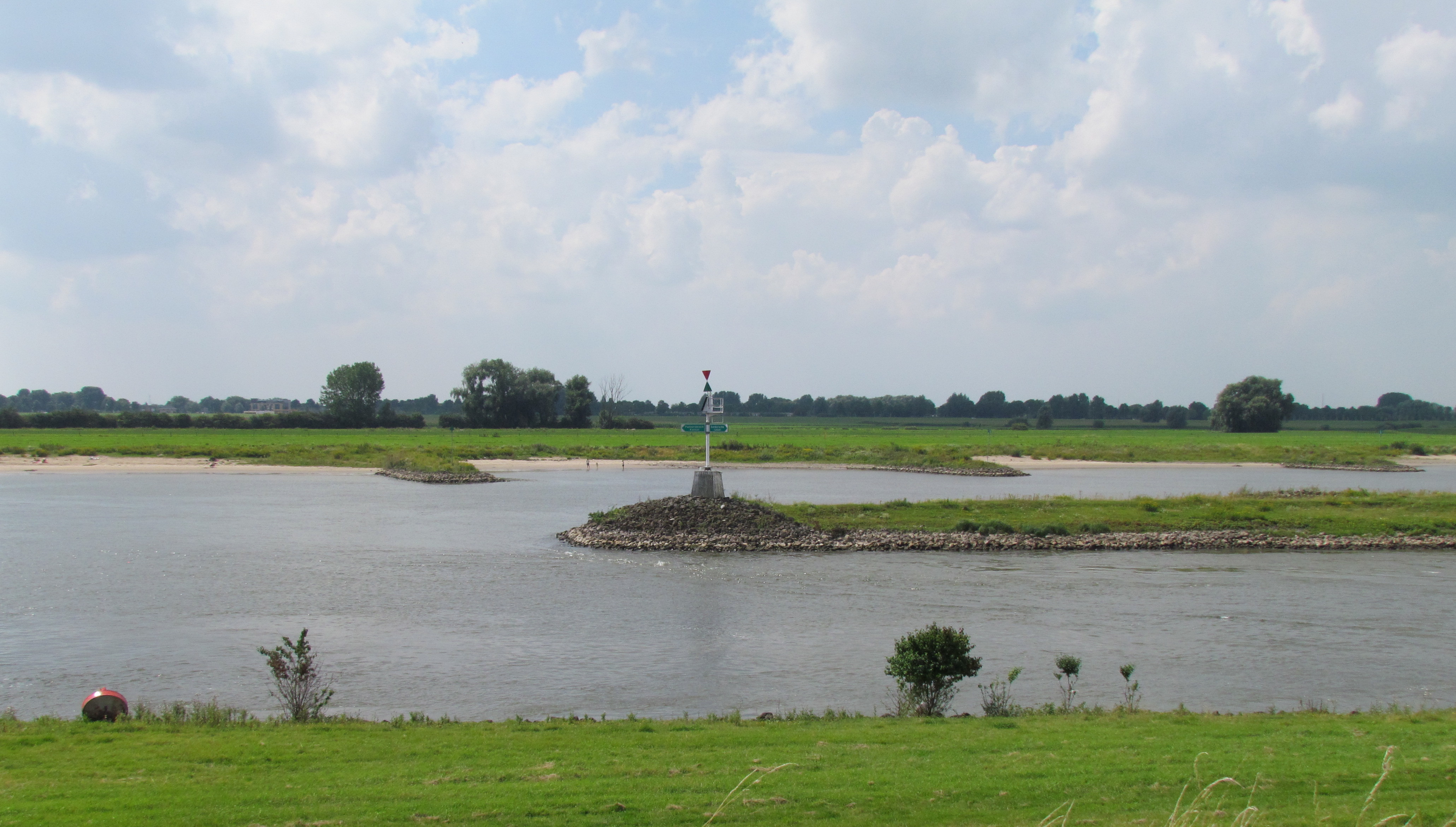 IJsselkop; landpunt waar de IJssel aftakt van de Neder-Rijn, tussen Westervoort, Huissen en Arnhem